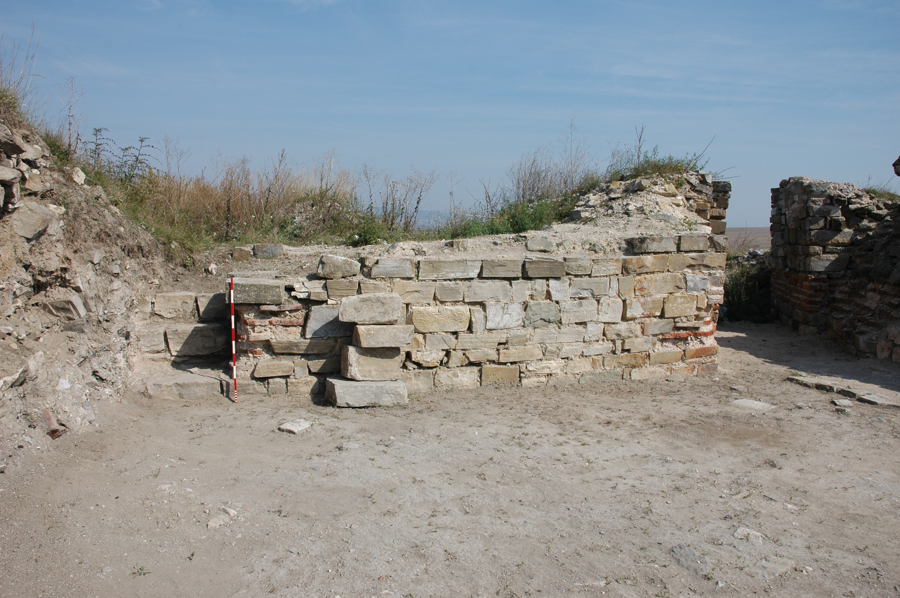 част от крепостната стена на Маркели с вход към кула. Снимката е на Исторически музей Карнобат - 2006г.